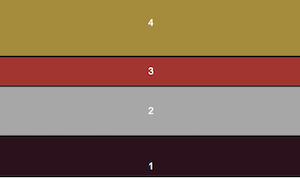 Schematische weergave van de grondlagen van de Zwolse Leemputten.